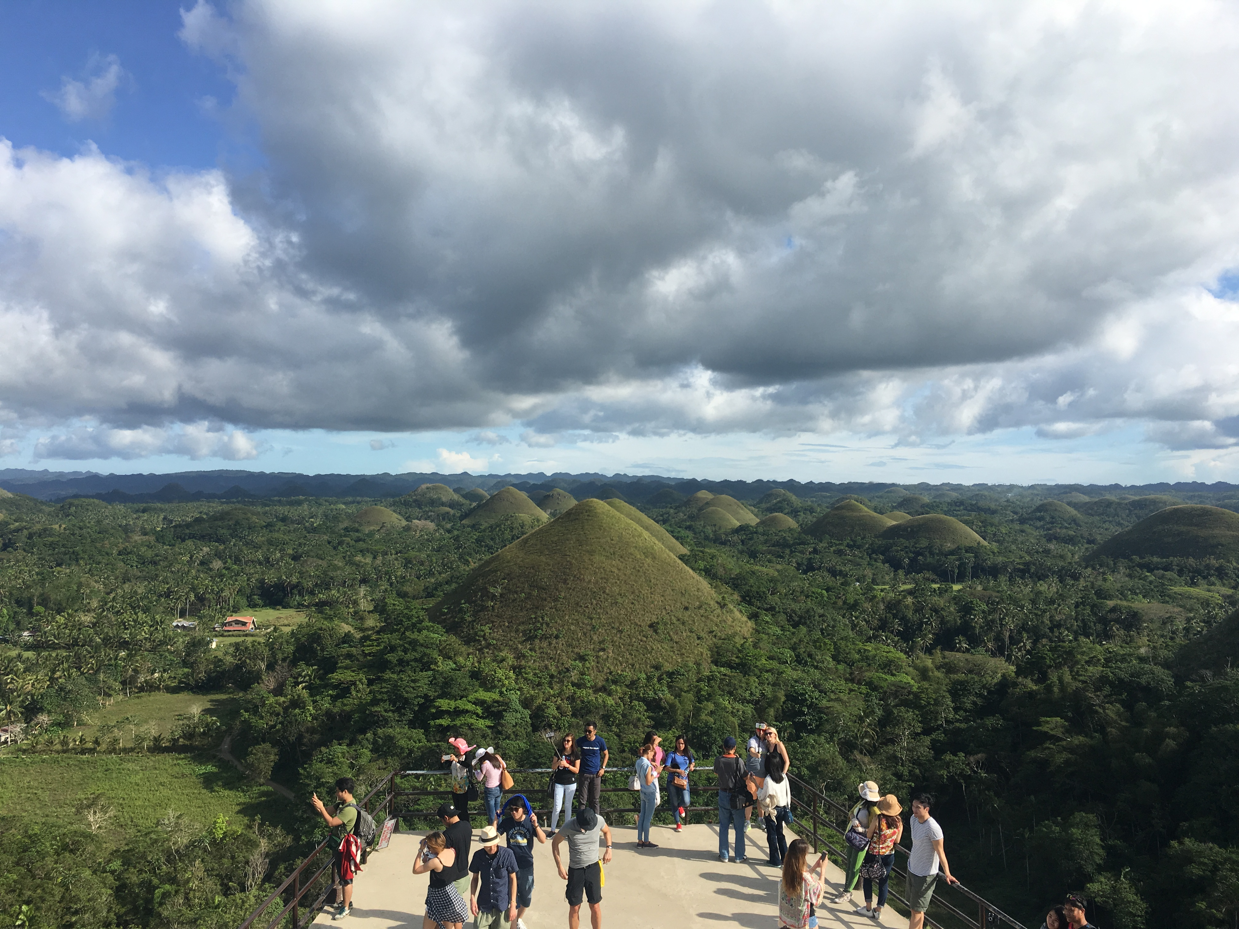 保和省巧克力山